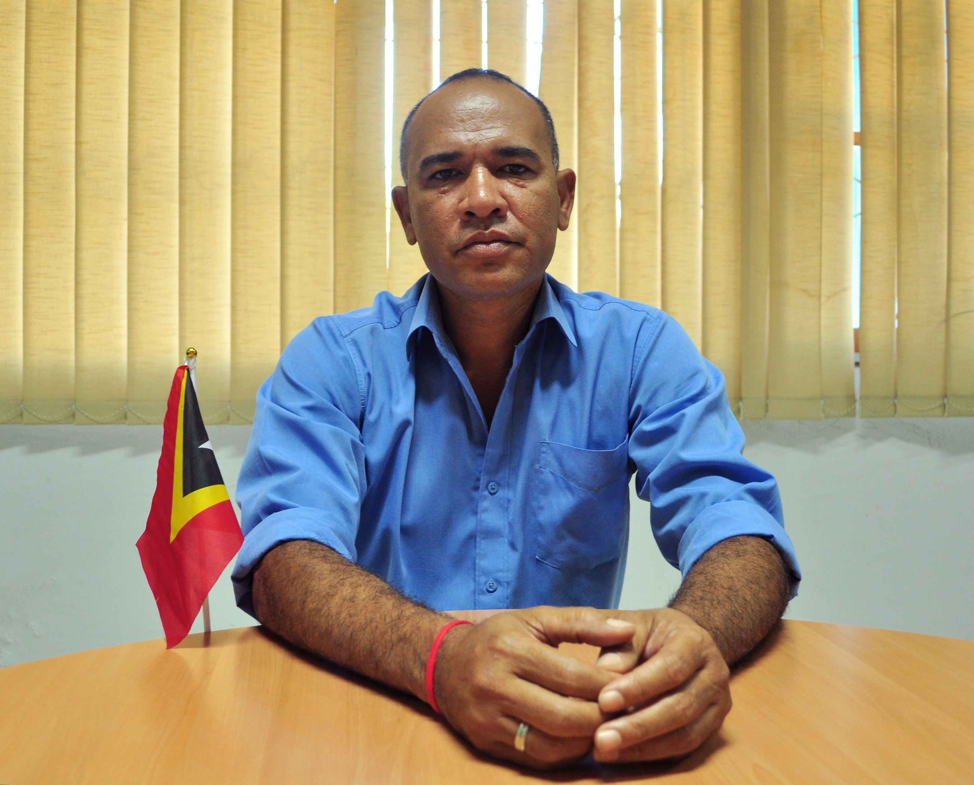 Luis Casimiro Lopes, Administrator des Subdistrikts Maubisse